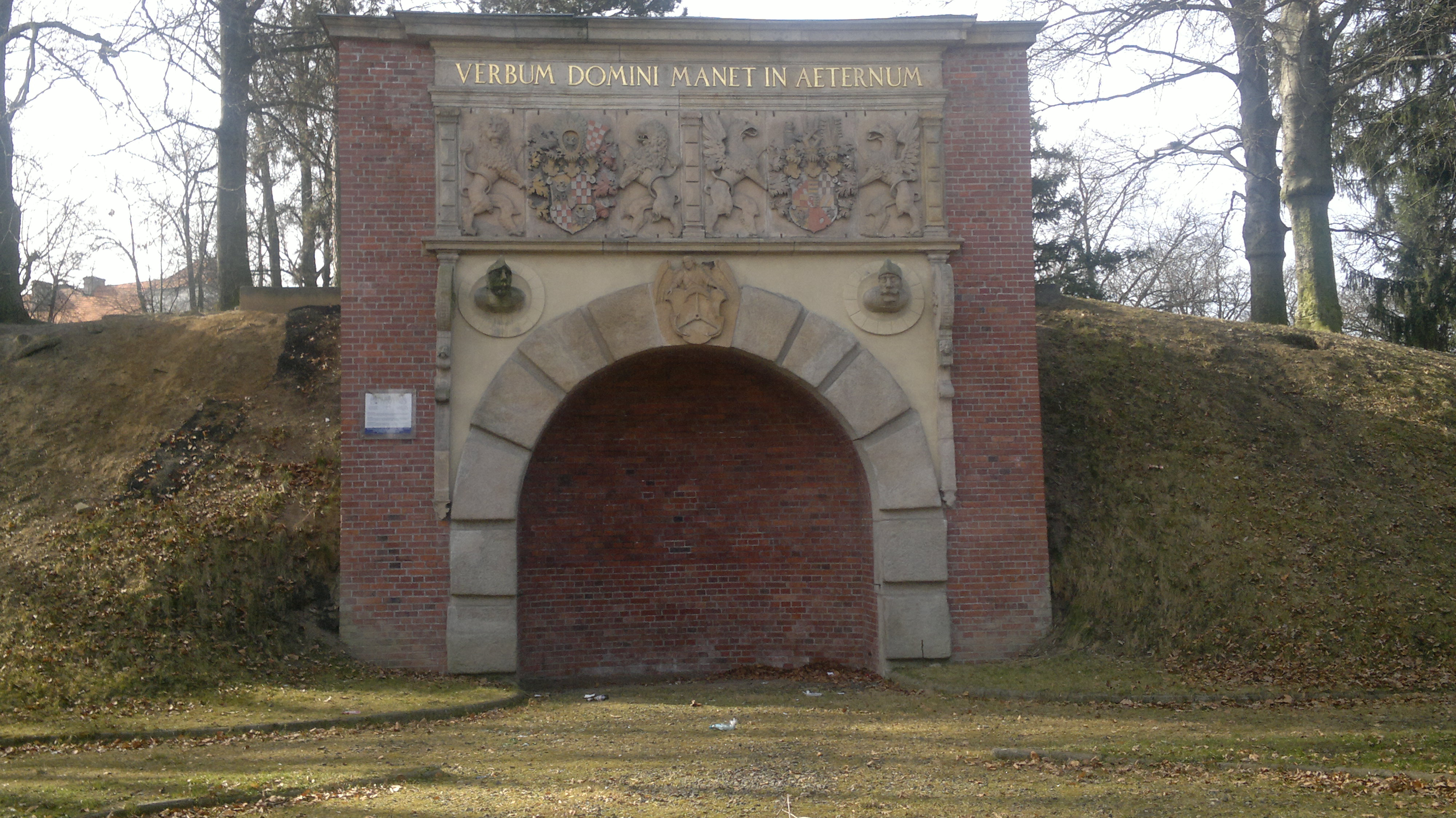 Brama Odrzańska w Brzegu